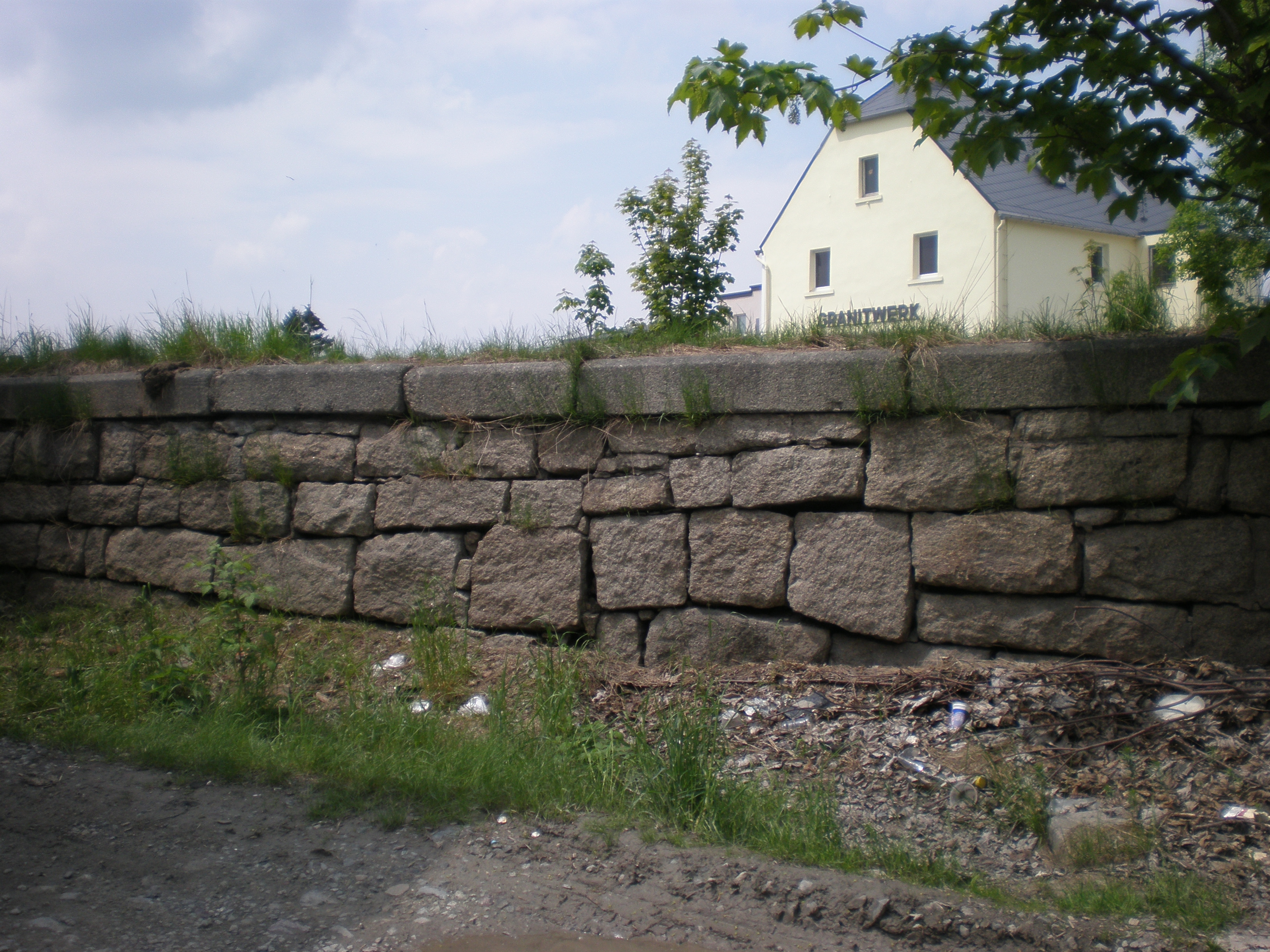 Die ehemalige Laderampe des Bahnhofes Weißenstadt